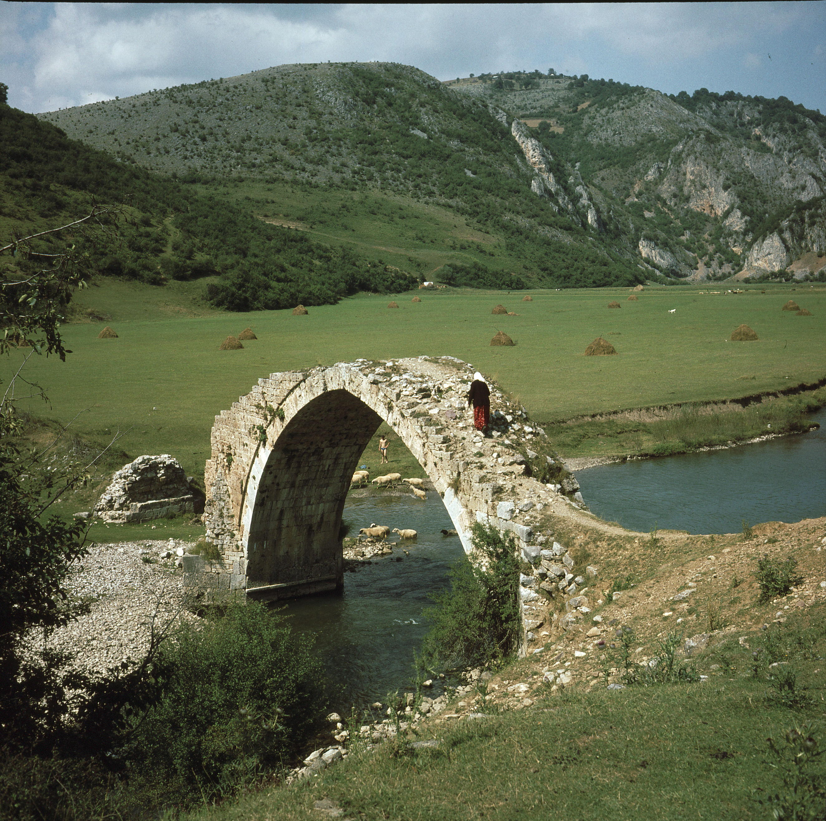 Мост преко реке Увац данас се налази на дну језера Увац.